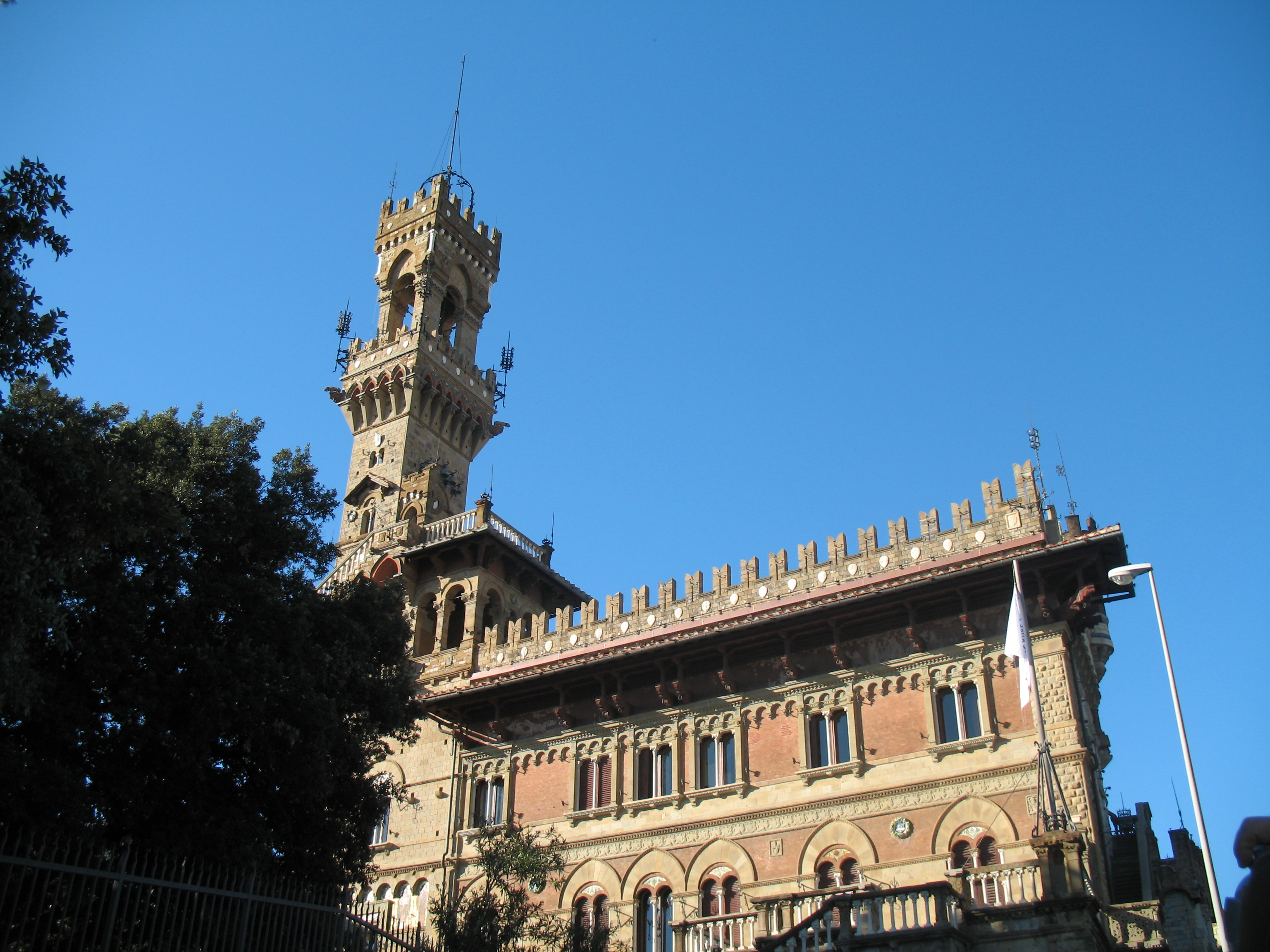 Immagine da Genova